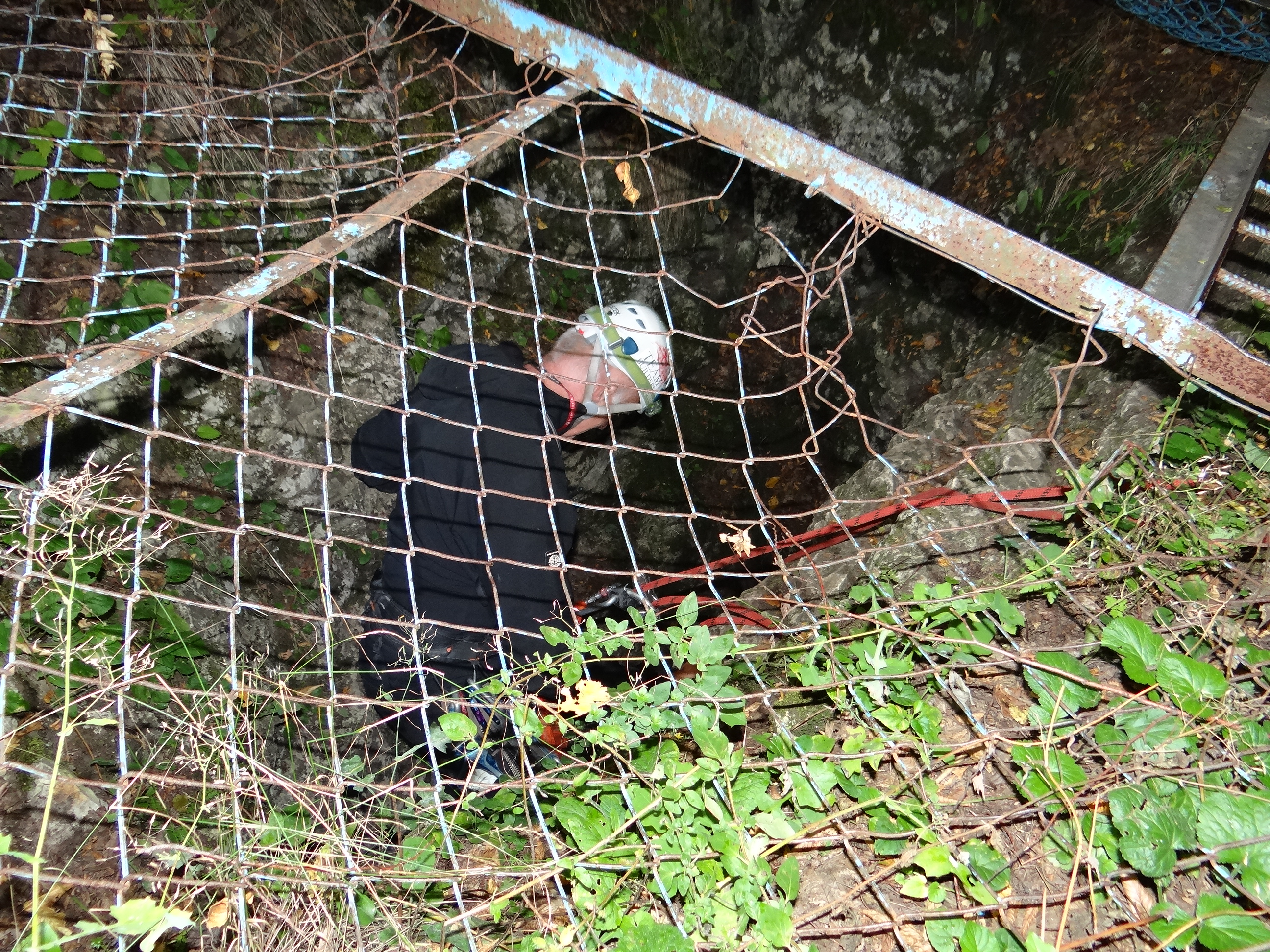 Jaskinia Racławicka.